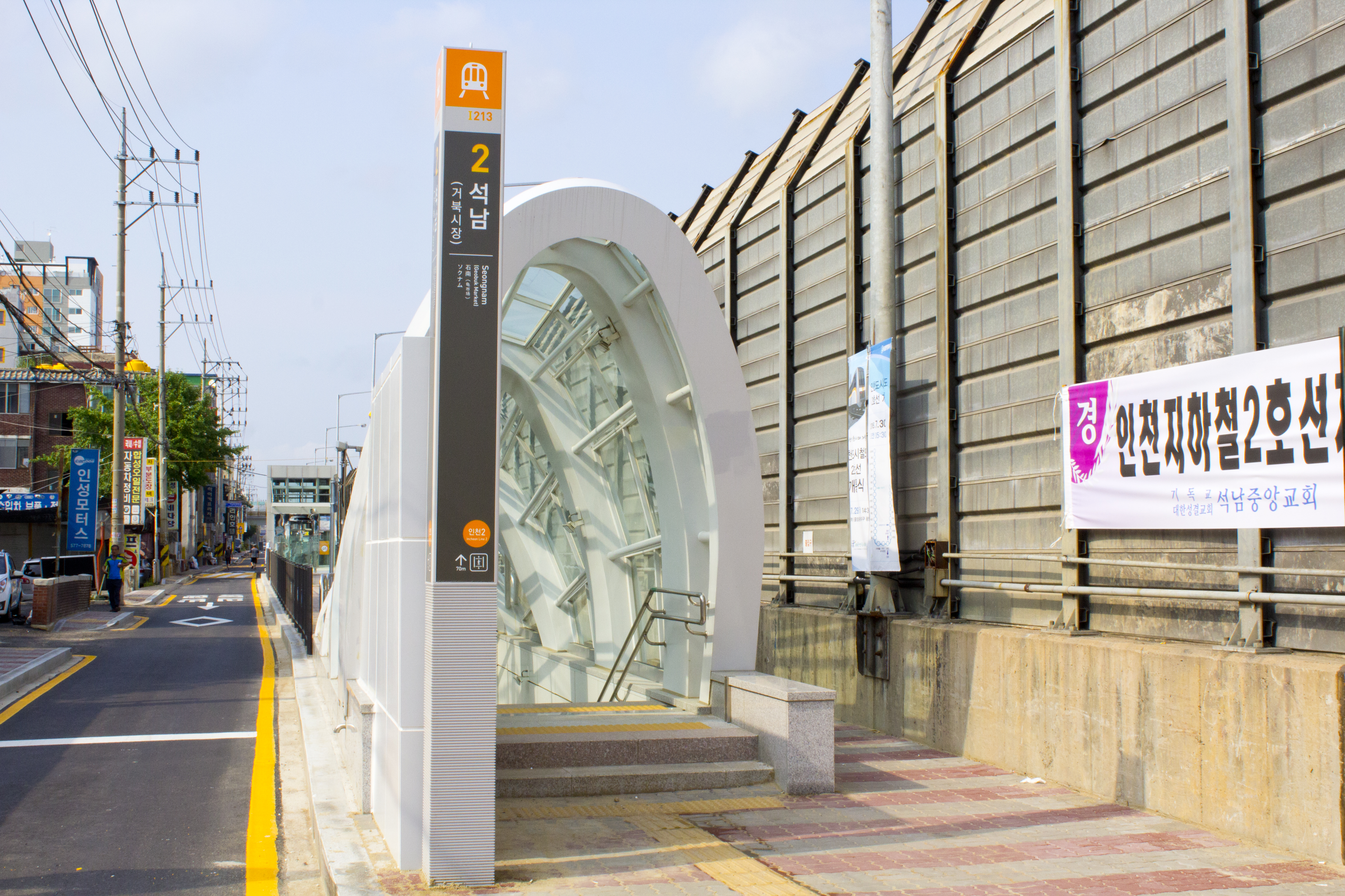 인천2호선 석남역 2번 출구